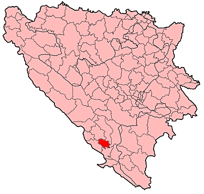 Prikaz općine Čitluk u Bosni i Hercegovini